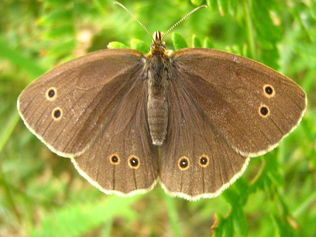 Aphantopus hyperantus, (Brauner Waldvogel) Familie Nymphalidae (Edelfalter). Fundort: Nauener Stadtwald (Brandenburg, Germany), auf Adlerfarn sitzend